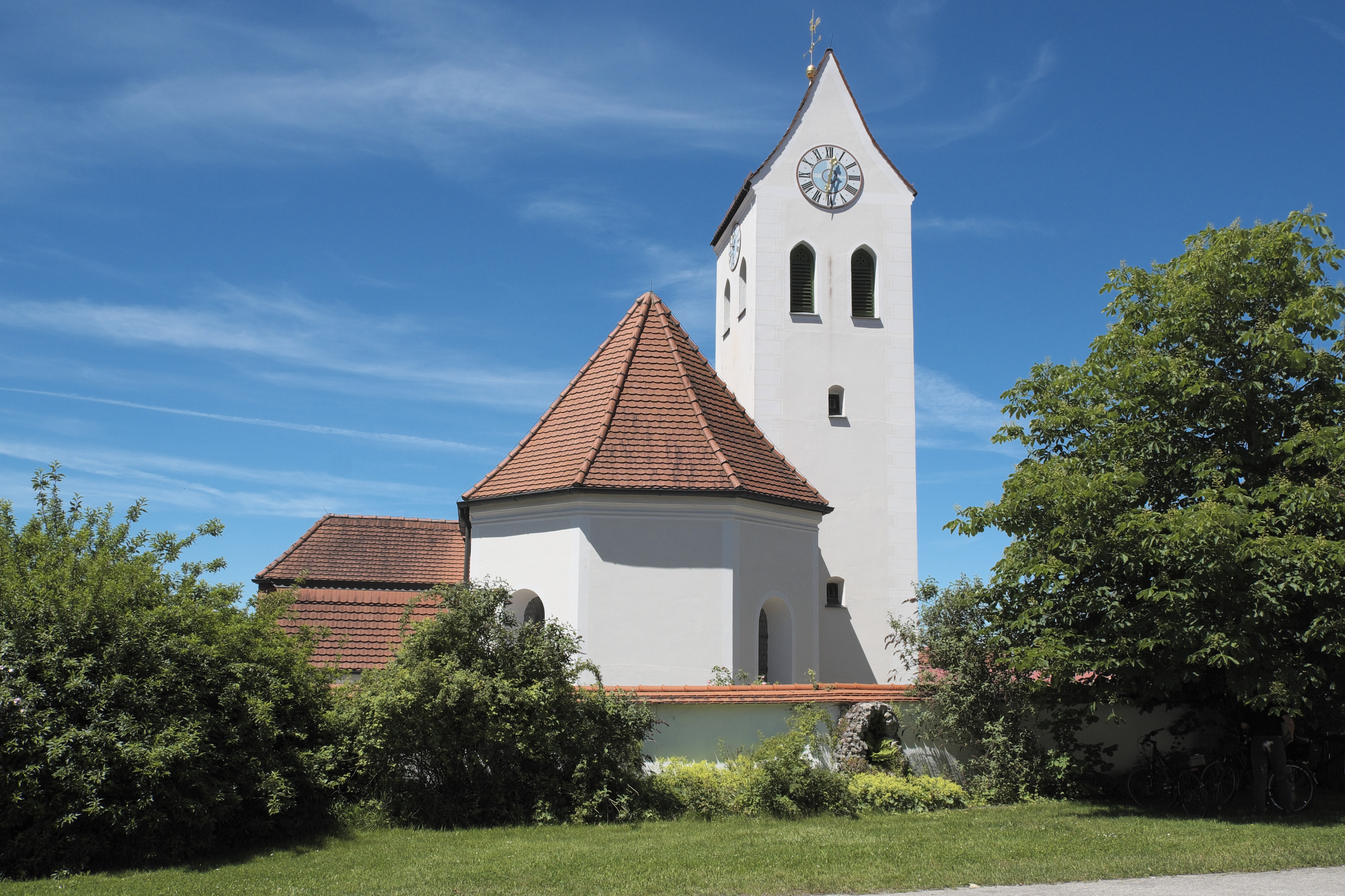 Katholische Filialkirche St. Johannes der Täufer in Hadorf (Starnberg) (Bayern, Deutschland)